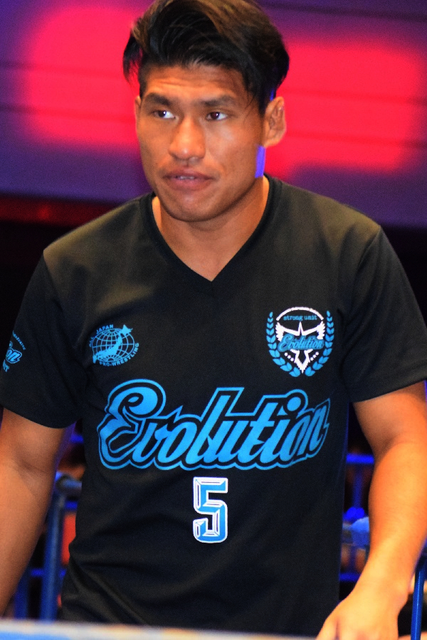 2018年4月20日 大阪府立体育会館・第2競技場 「2018 チャンピオン･カーニバル」 岡田佑介